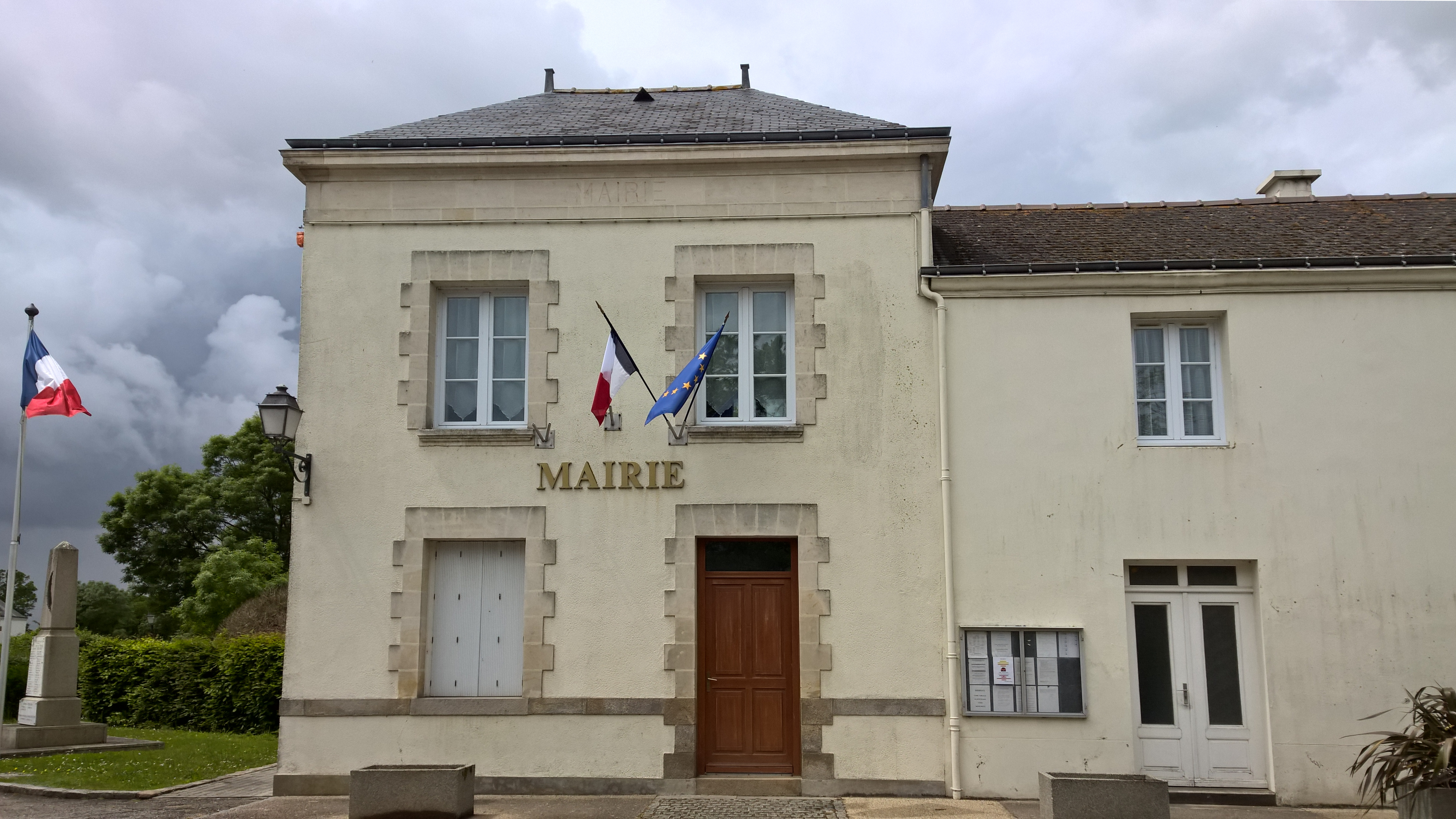 Mairie, Fr-44-Lavau-sur-Loire.